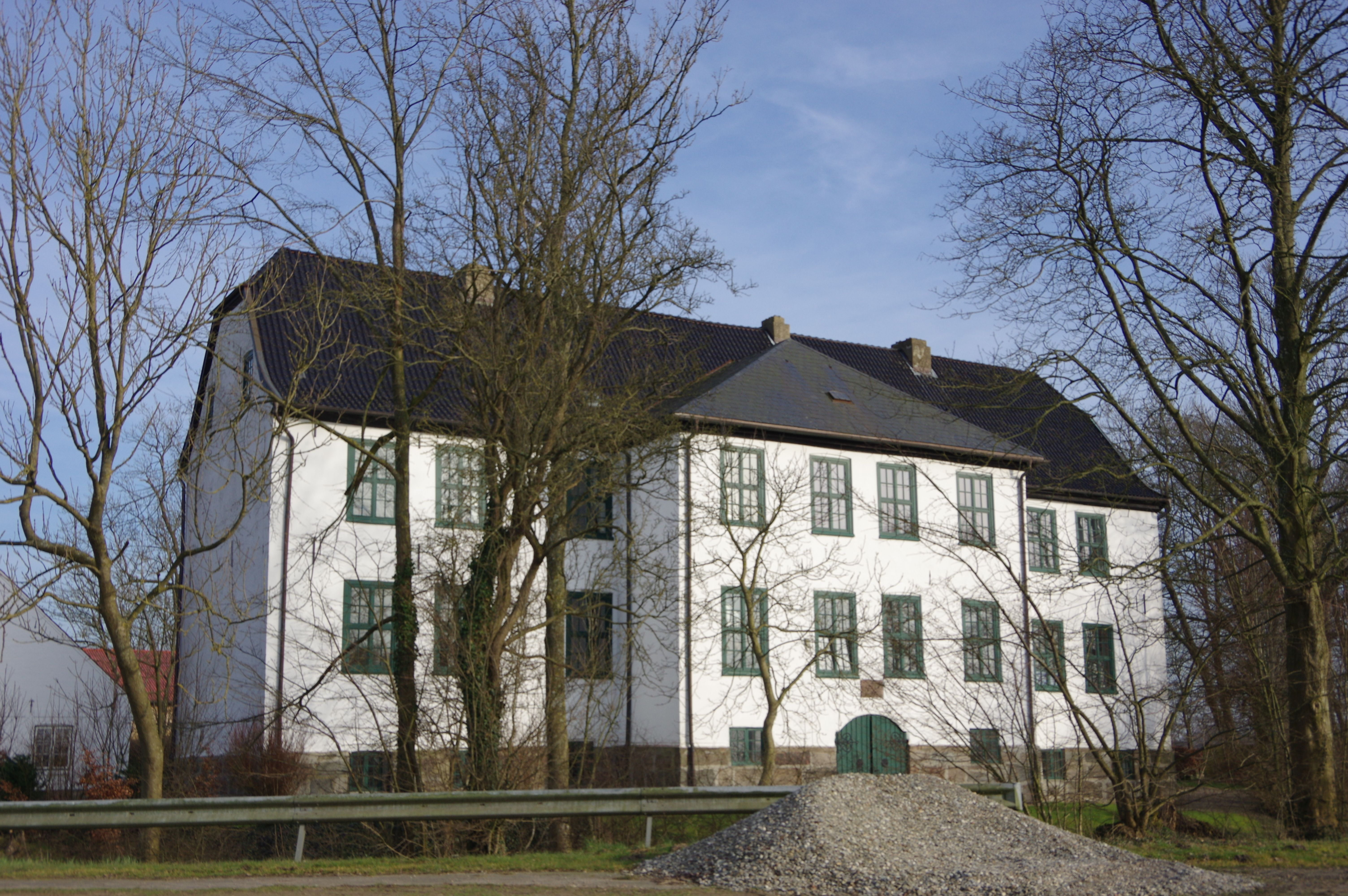 Dollrottfeld in Schleswig Holstein. Das Gut Dollrott von der westlichen Seite.